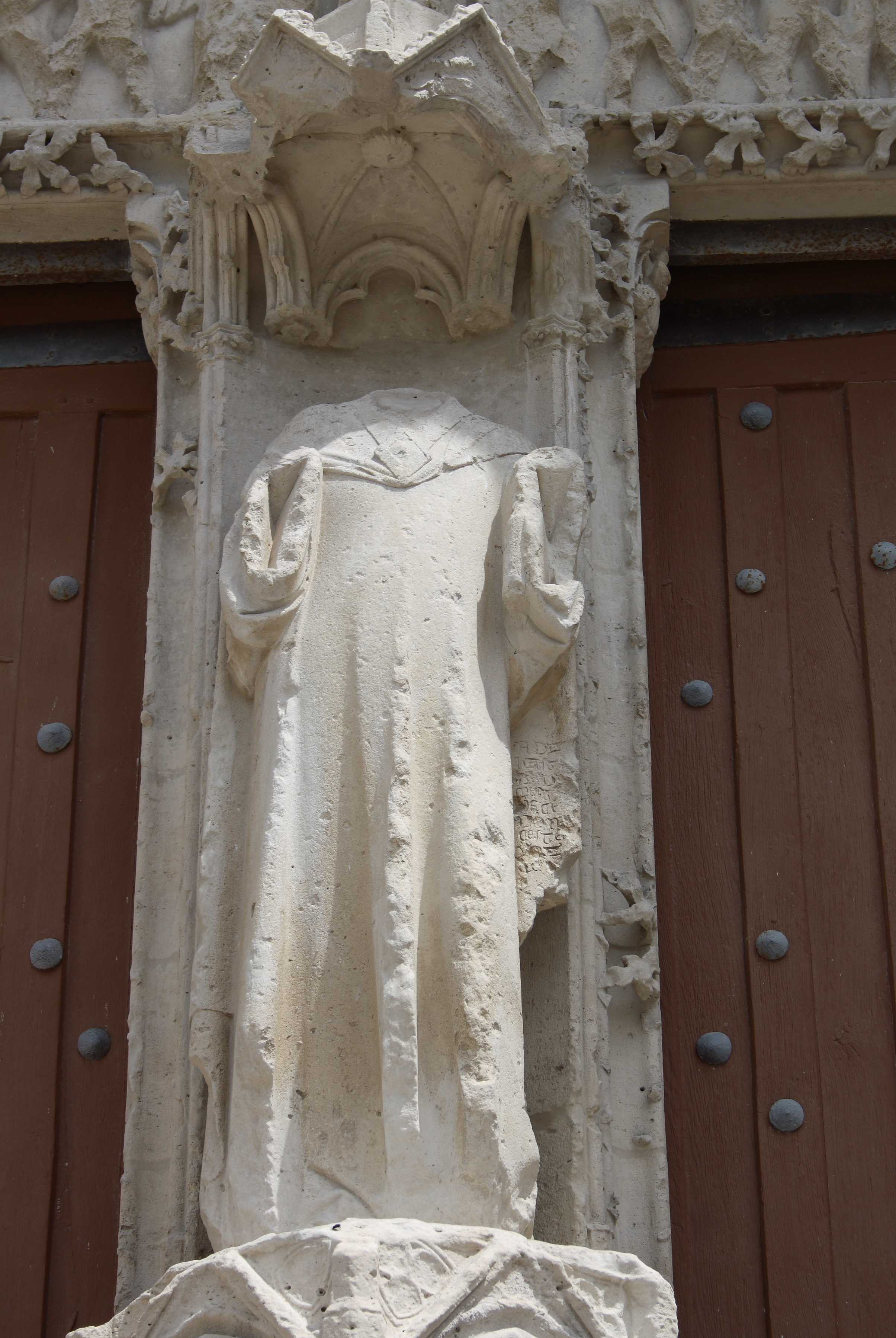 Hauptportal der katholischen Kirche Saint-Sulpice-de-Favières in Saint-Sulpice-de-Favières im Département Essonne (Île-de-France), Trumeaupfeiler mit der Skulptur des hl. Sulpicius des Frommen (ohne Kopf)